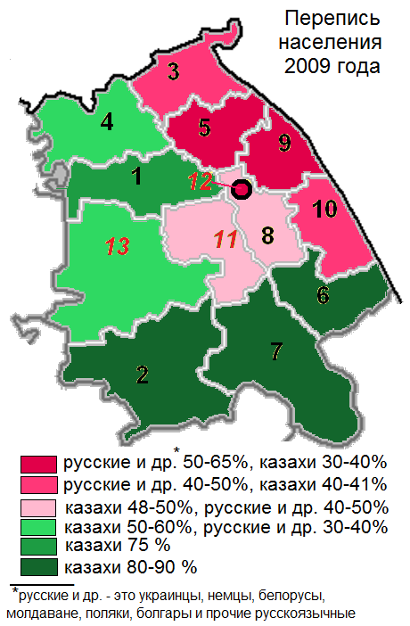 Доля казахов, русских и др. по районам Павлодарской области по переписи населения 2009 года